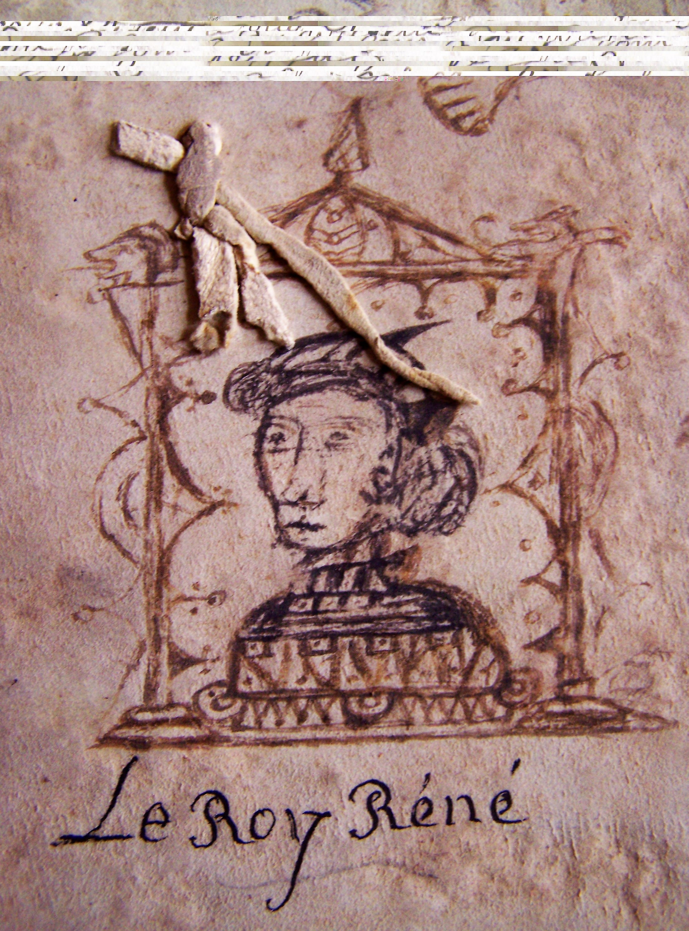 Dessin à la plume représentant le roi René.